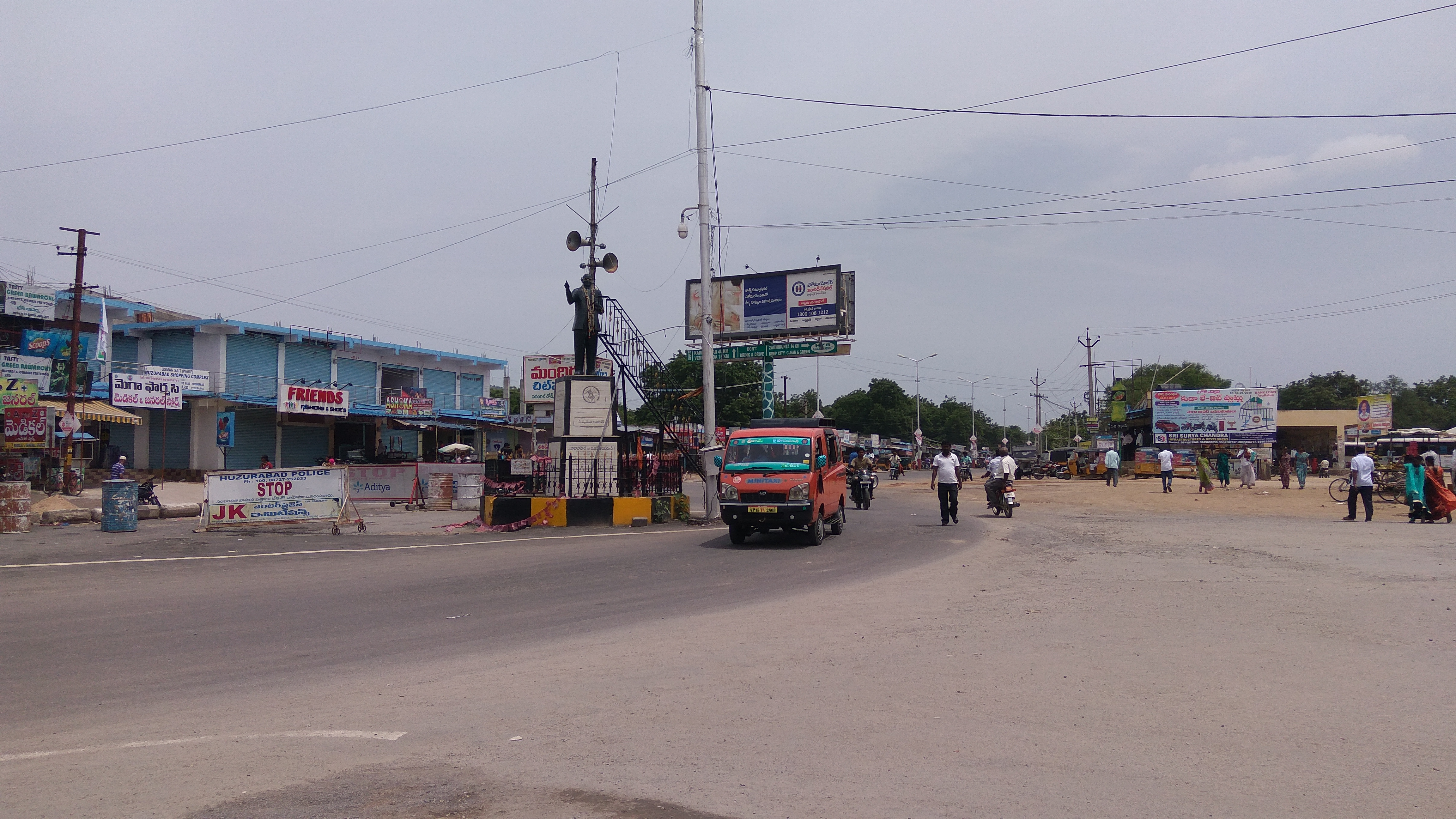 హుజురాబాద్ లోని అంబేద్కర్ కూడలి